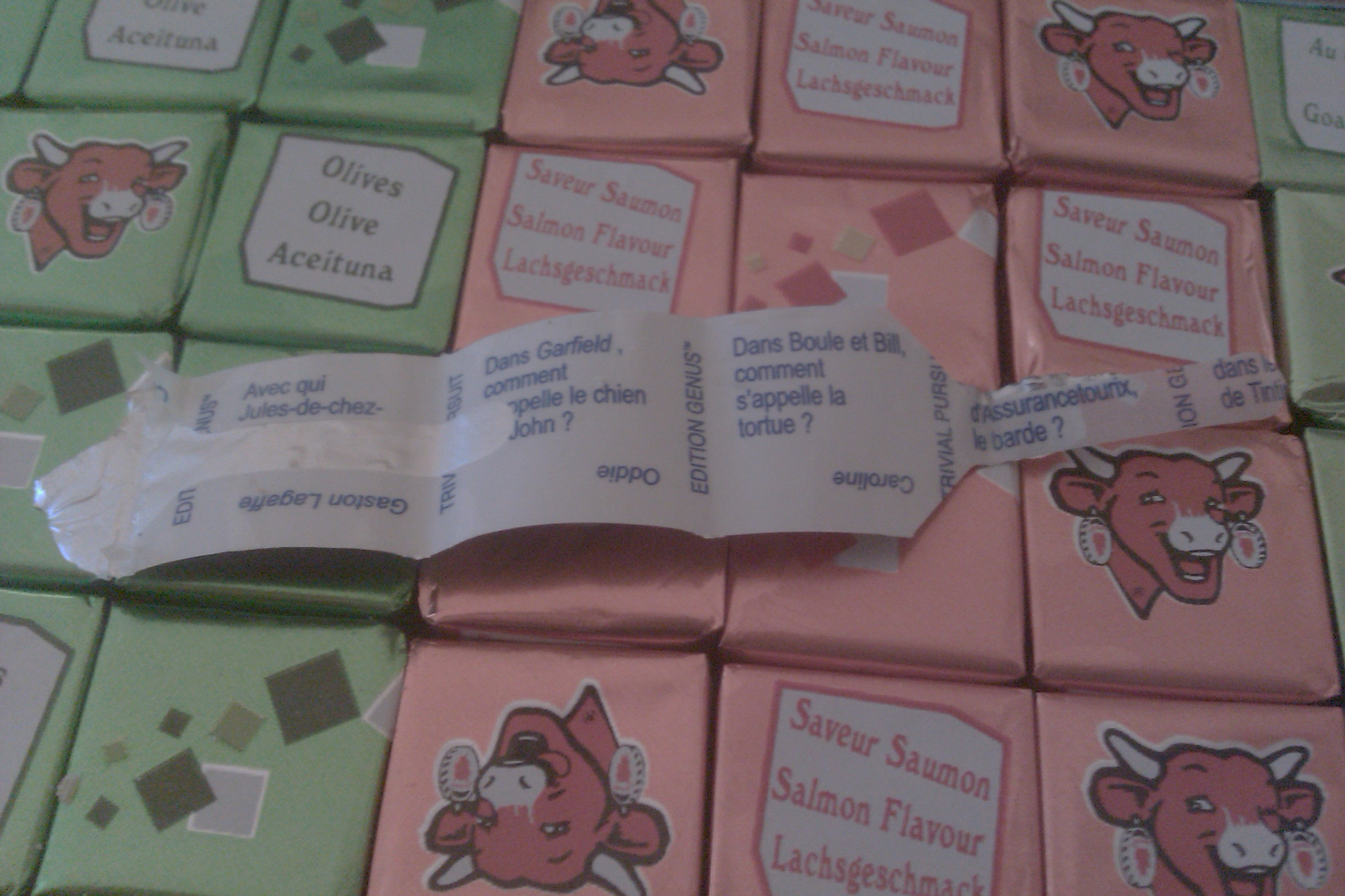 Fransk ost med spørgsmål